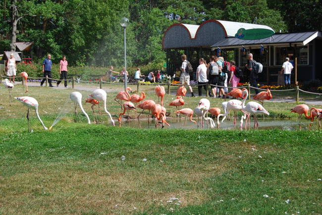 Parken Zoo 2008, Flamingodammen.